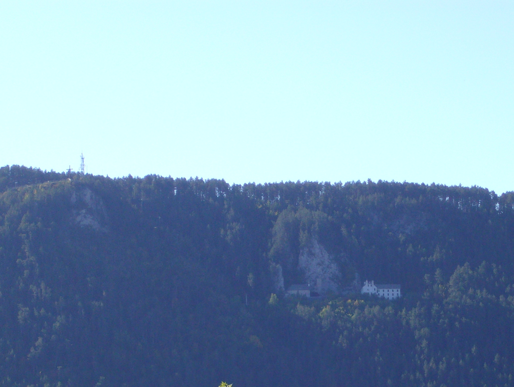 ermitage de la ville de Mende, Lozère, France